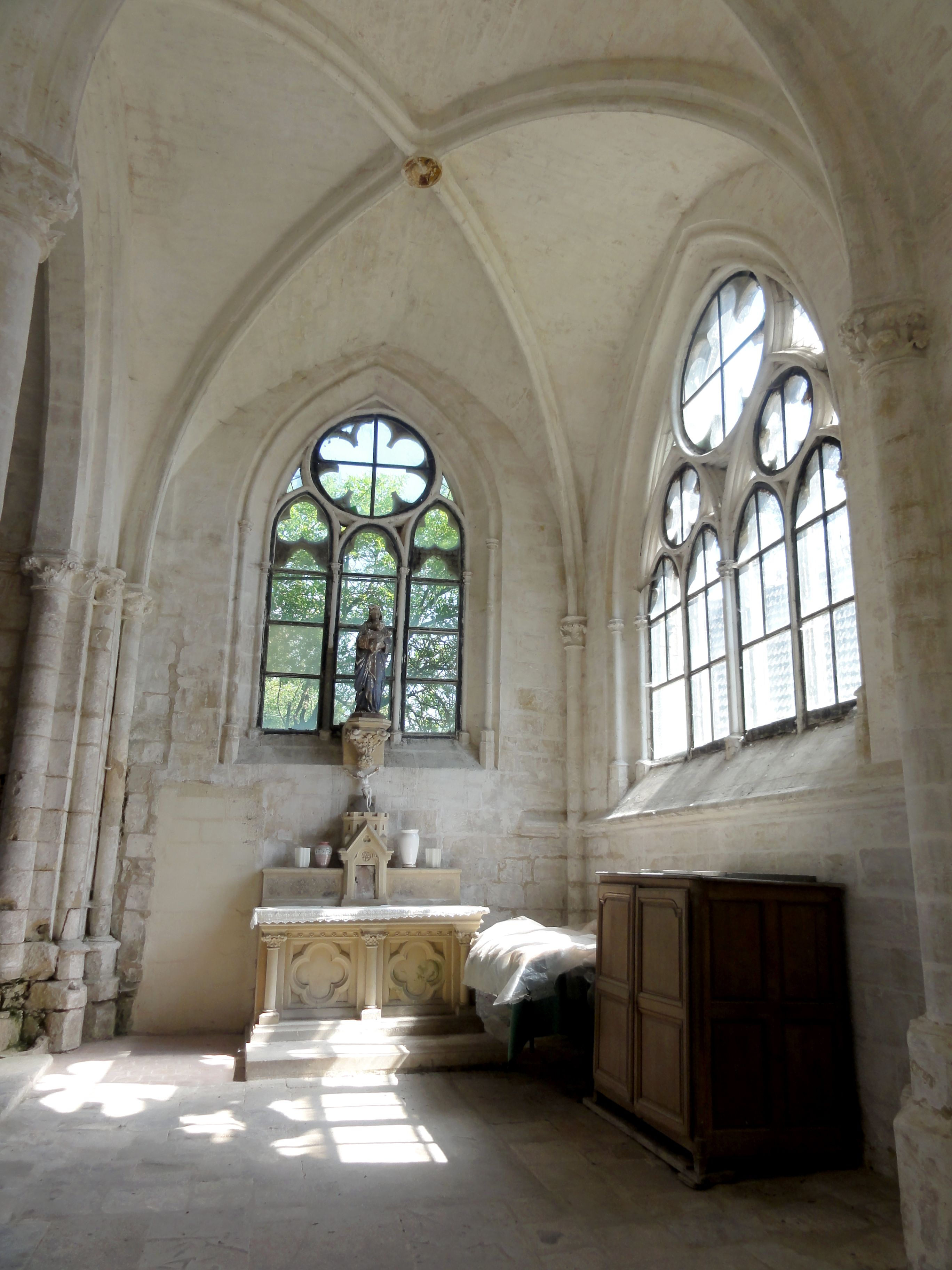 Chapelle sud, vue vers l'est.